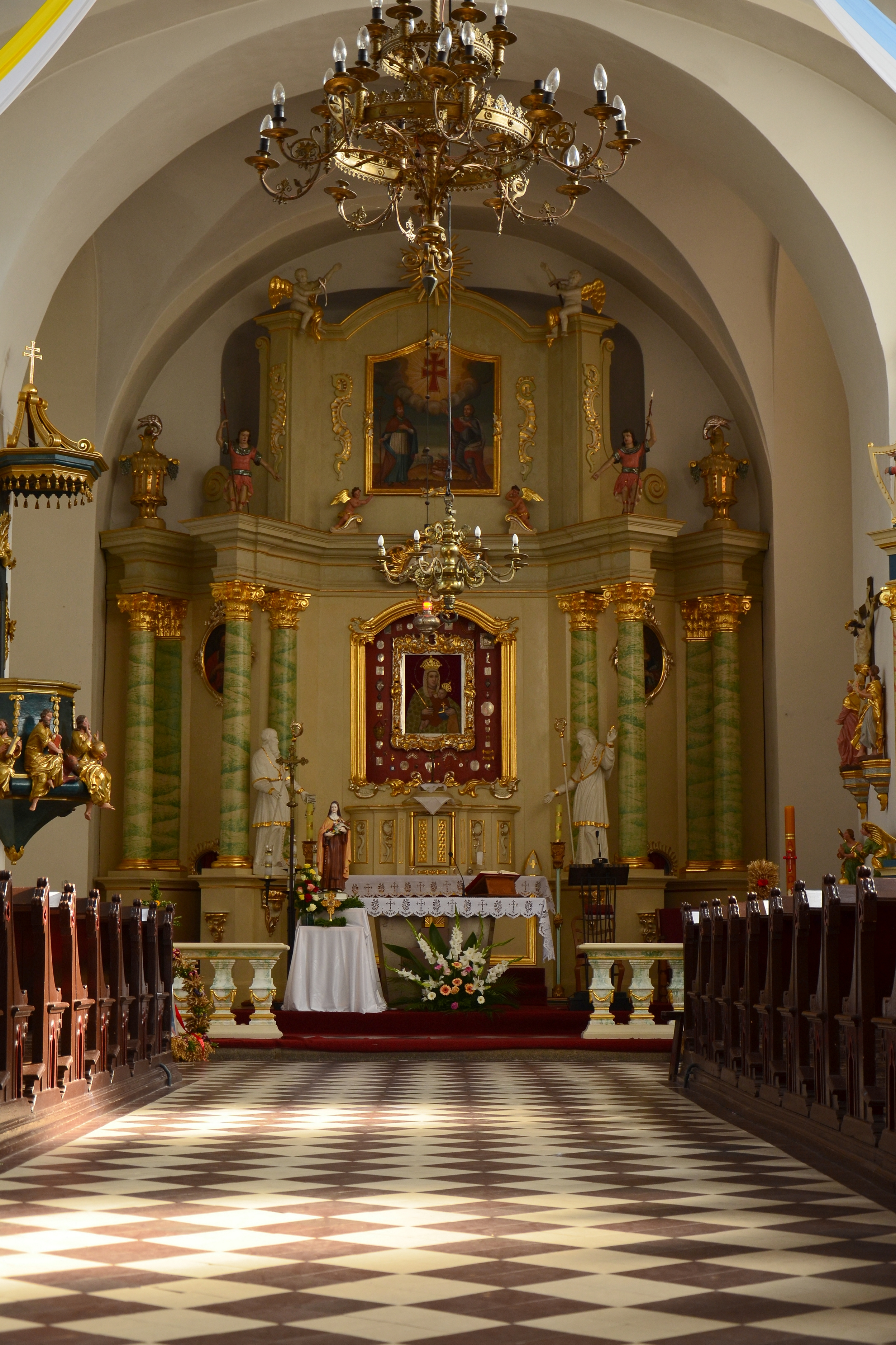 Górzno, kościół par. pw. Św. Krzyża, 1765-1773